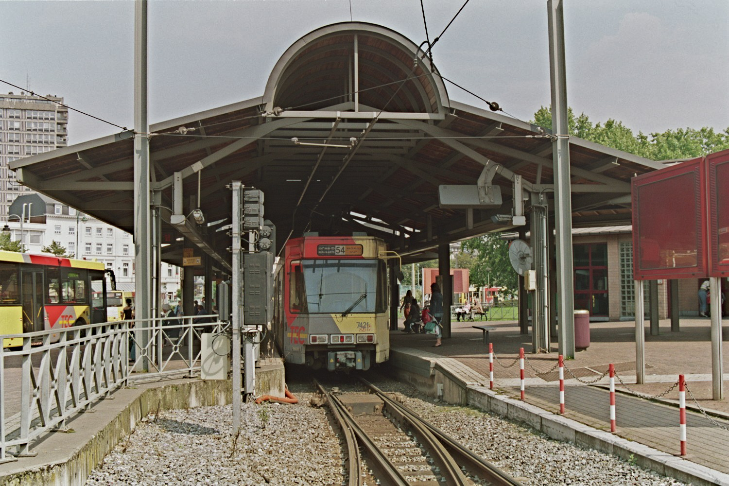 Charleroi - métro léger - gare du sud